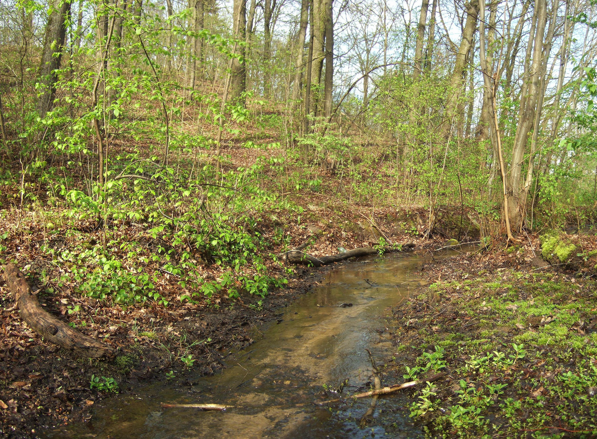 Cedrono upelio slėnis (Vilnius)